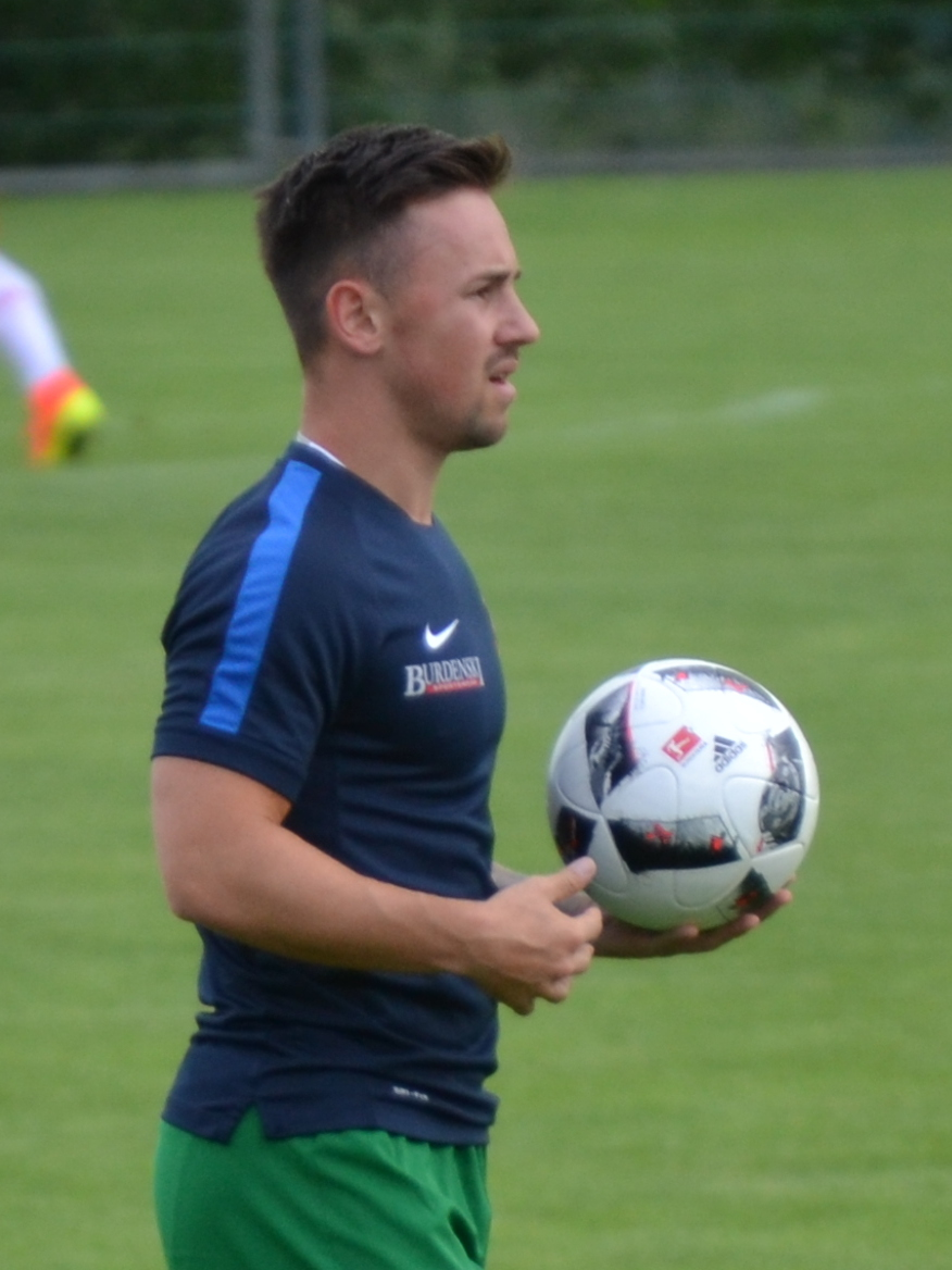 Simon Handle beim Aufwärmen im Freundschaftsspiel von Erzgebirge Aue beim HFC Colditz im Juni 2016